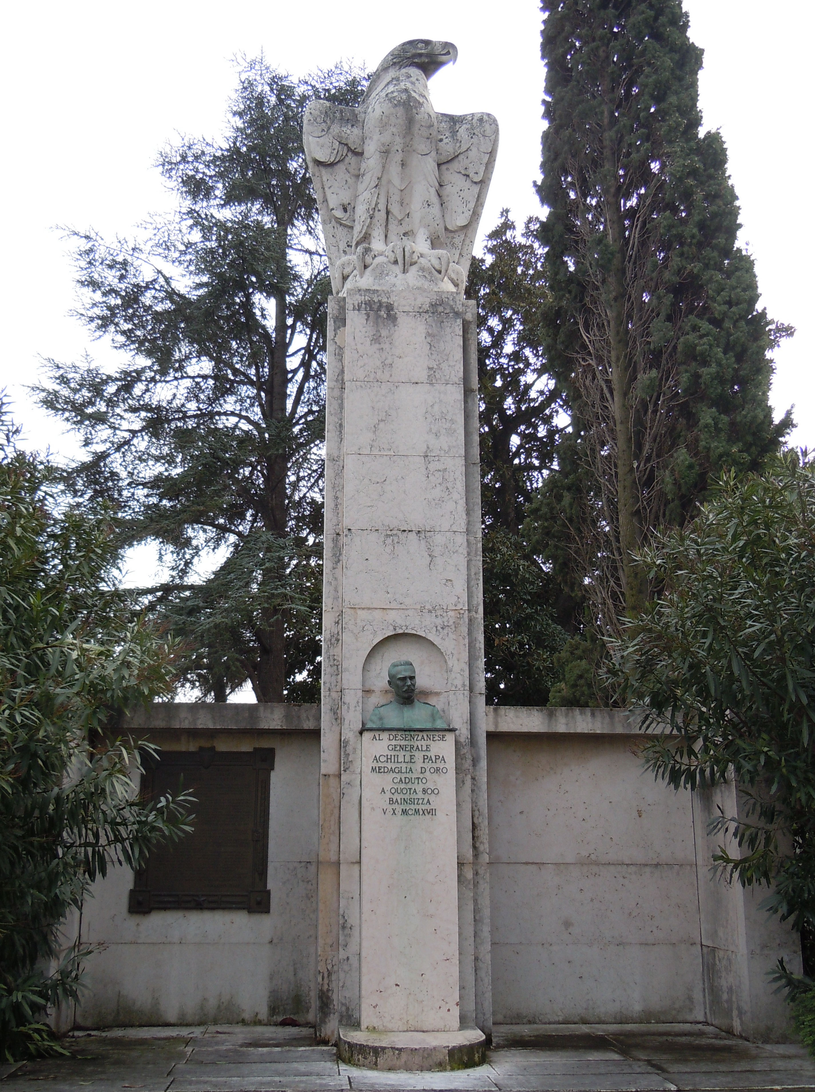 Desenzano del Garda, monumento al generale Papa